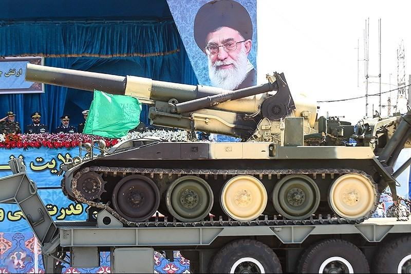 Military Parades Held in Tehran to Mark National Army Day - TEHRAN (Tasnim) - Massive military parades were held near the mausoleum of the late founder of the Islamic Republic of Iran, Imam Khomeini, south of Tehran, on Tuesday with high-ranking officials and senior military commanders in attendance.